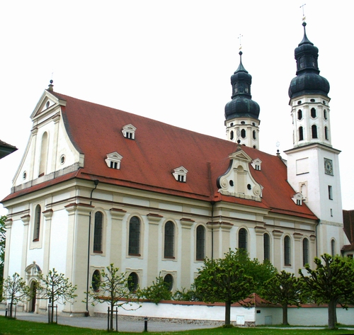 Klosterkirche/Münster Obermarchtal Selbst fotografiert von Benutzer:Enslin am 16.5.2005